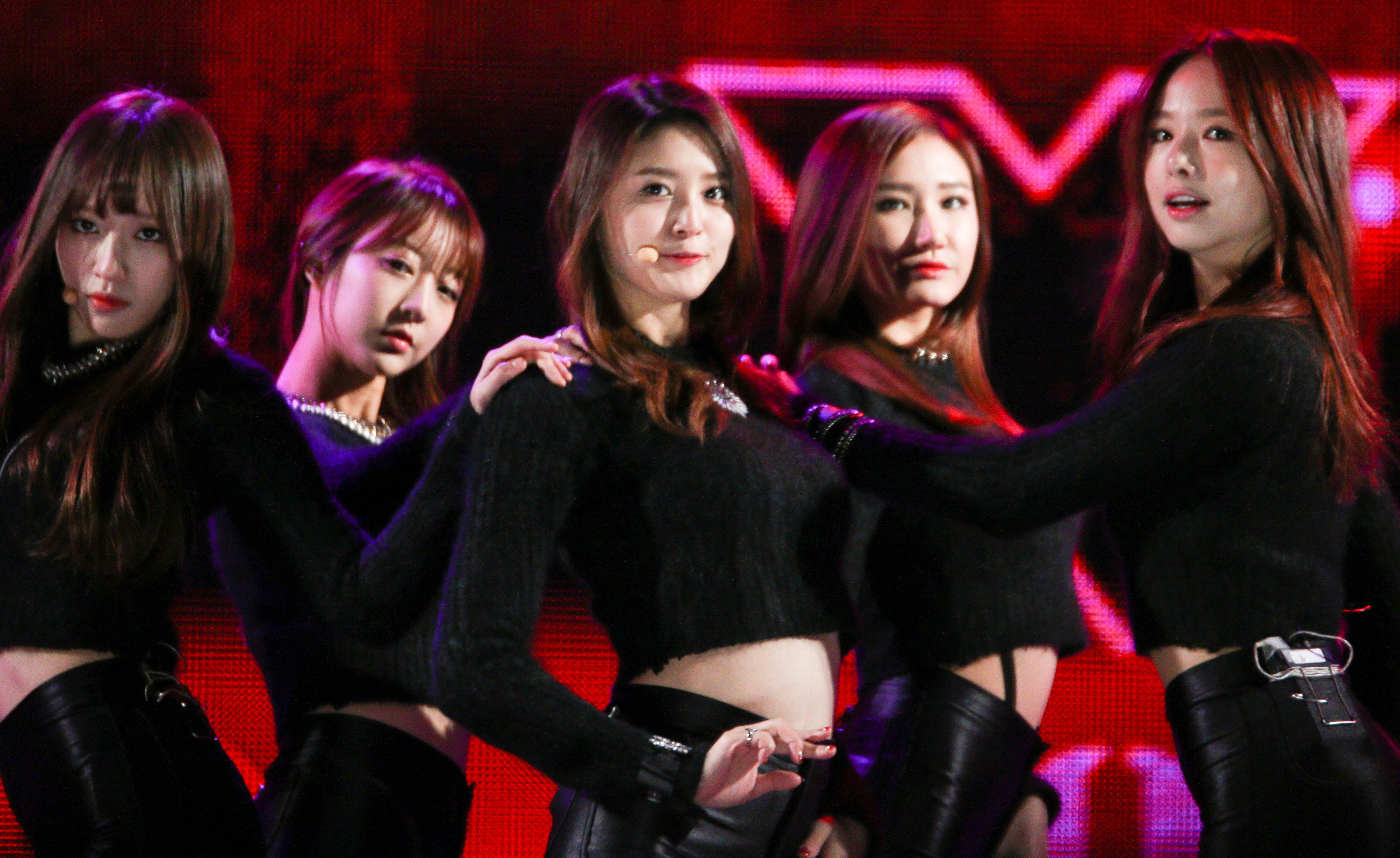 141211 EXID 더쇼 in 코엑스 야외무대